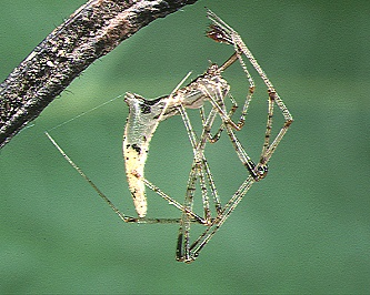 male Rhomphaea tanikawai from Okinawa.